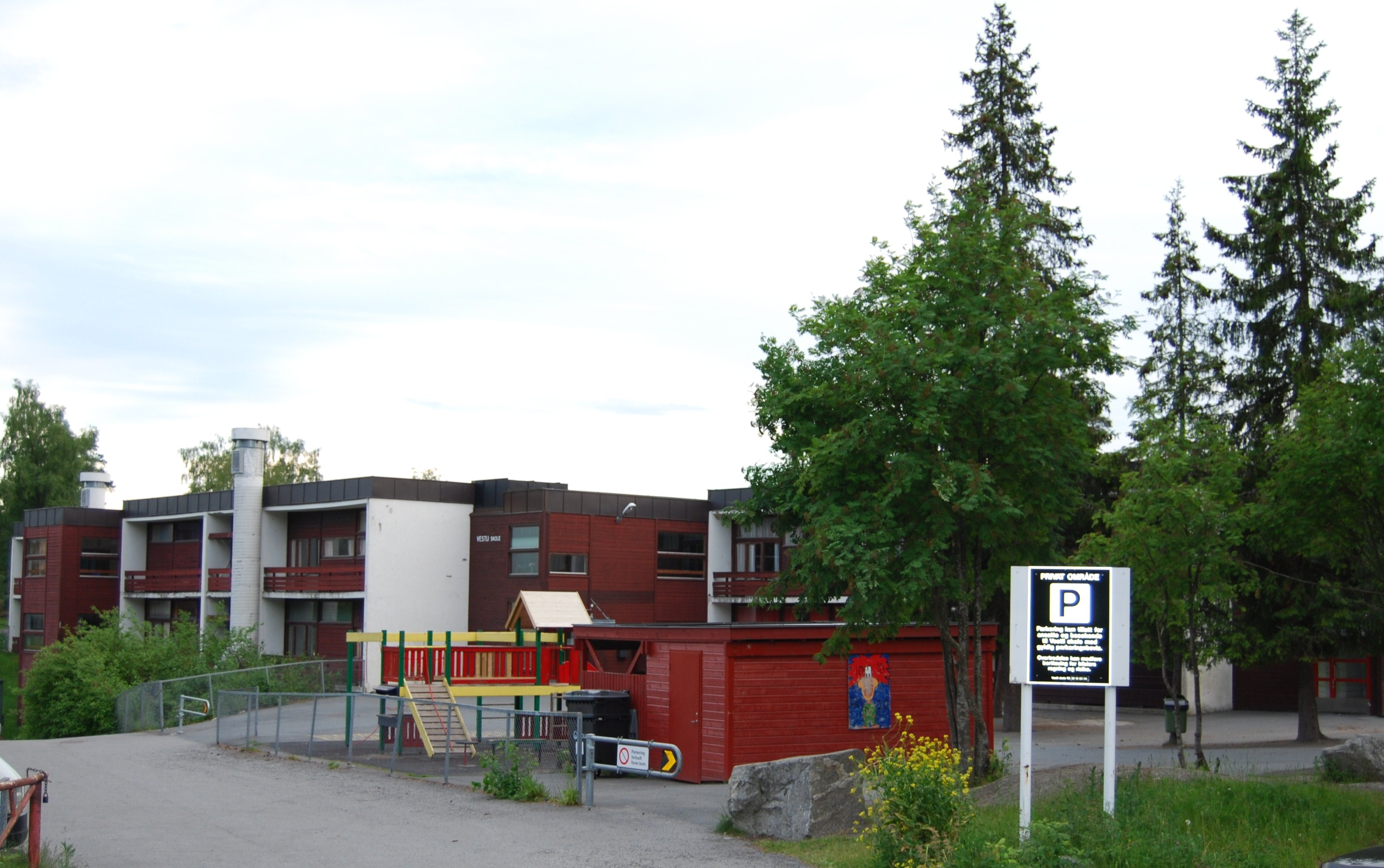 Vestli skole (Oslo) 2009